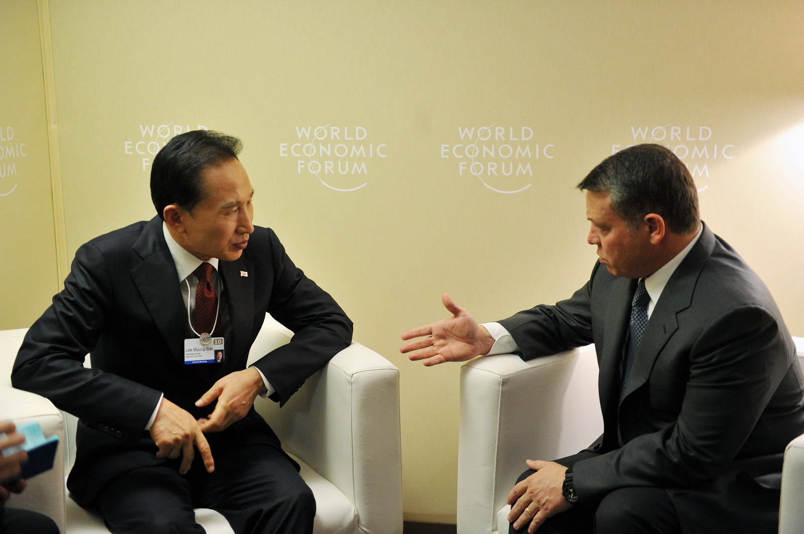 President Lee Myung-bak (left) and Jordanian King Abdullah talk in a bilateral summit in Davos, Switzerland, (Jan 28).